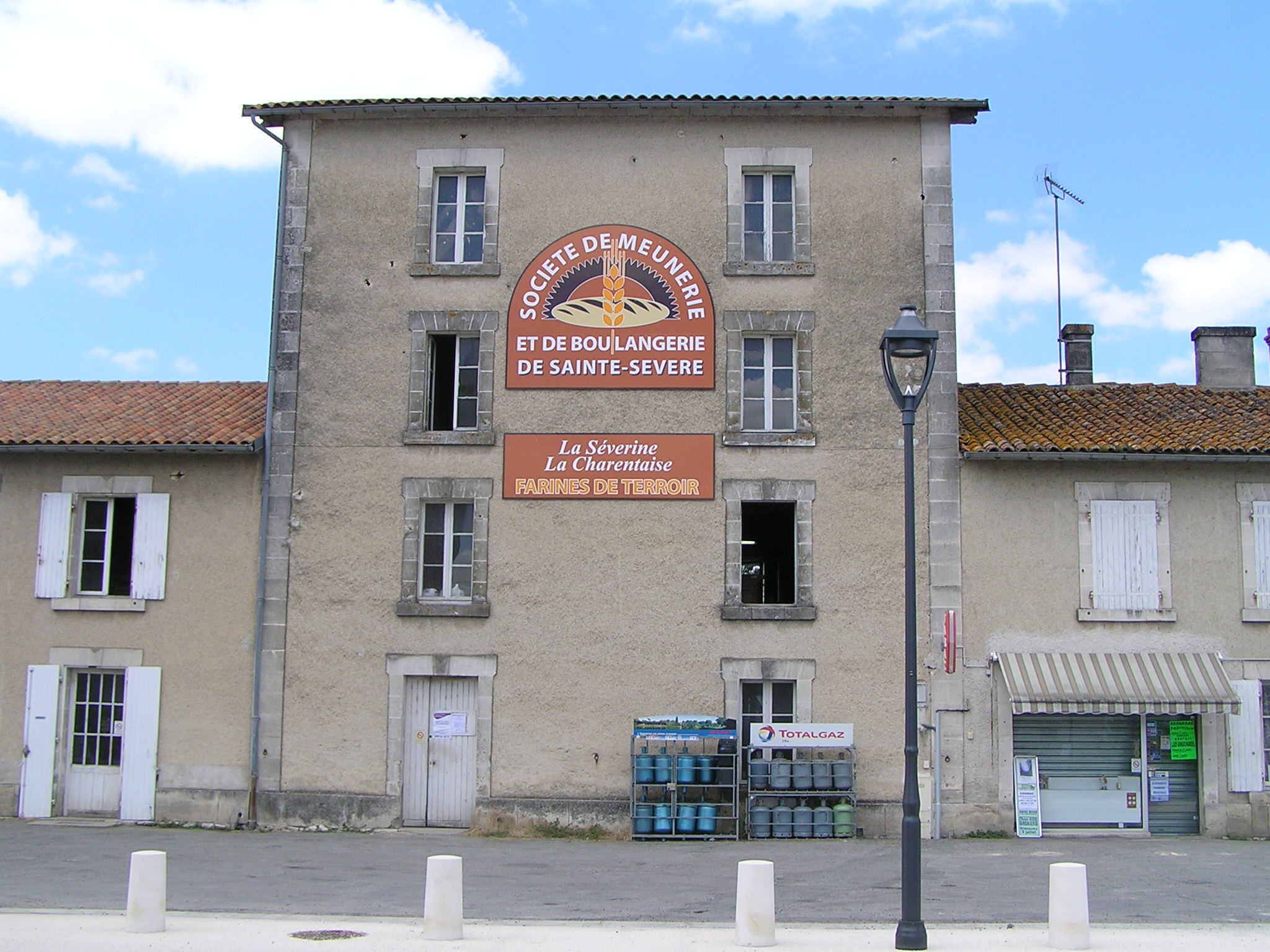 la meunerie et la boulangerie de Sainte-Sévère